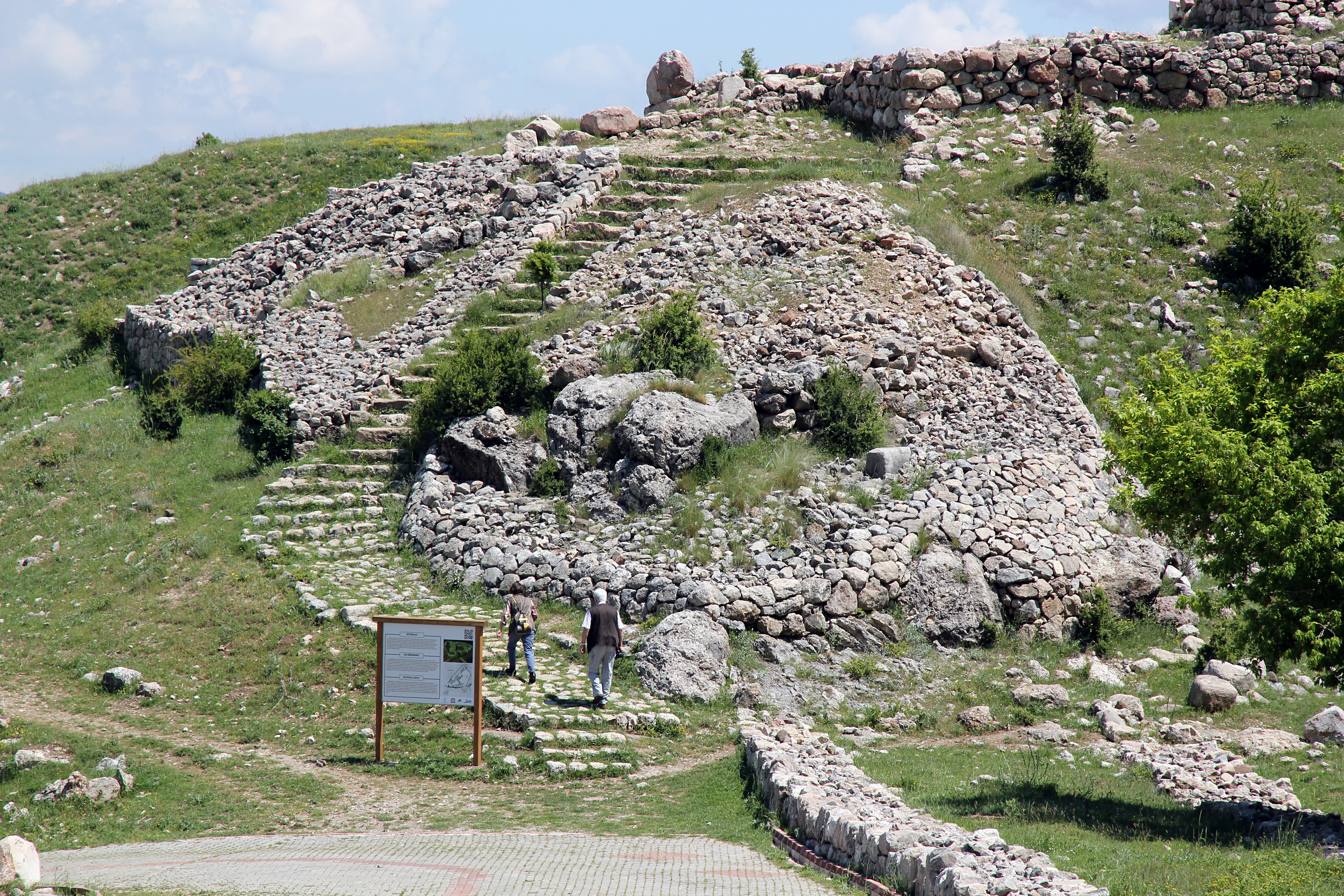 Büyükkale, die Zitadelle der hethitischen Hauptstadt Hattuša bei Boğazkale, Zentraltürkei, Ansicht von Südwesten mit moderner Treppe